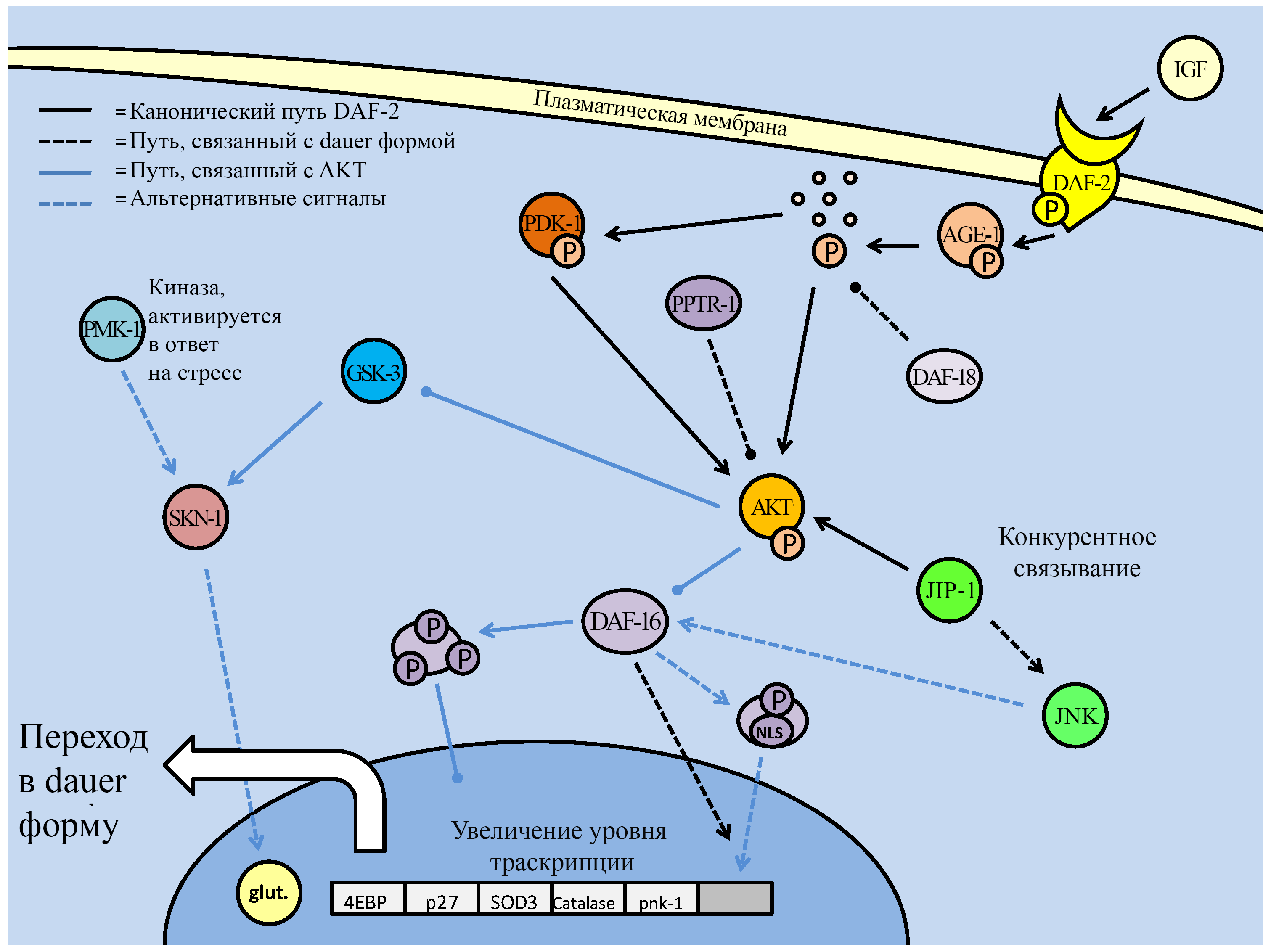 Фосфорилирование транскрипционного фактора DAF-16 (гомолога FoxO) предотвращает переход в dauer форму. Это фосфорилирование регулируется протеин-киназами (PDK-1) и фосфатазами (DAF-18 и PPTR-1). Важное место в каскаде занимает протеин-киназа AKT. Адаптировано для русской аудитории из Benjamin Lant and Kenneth Storey, 2010.